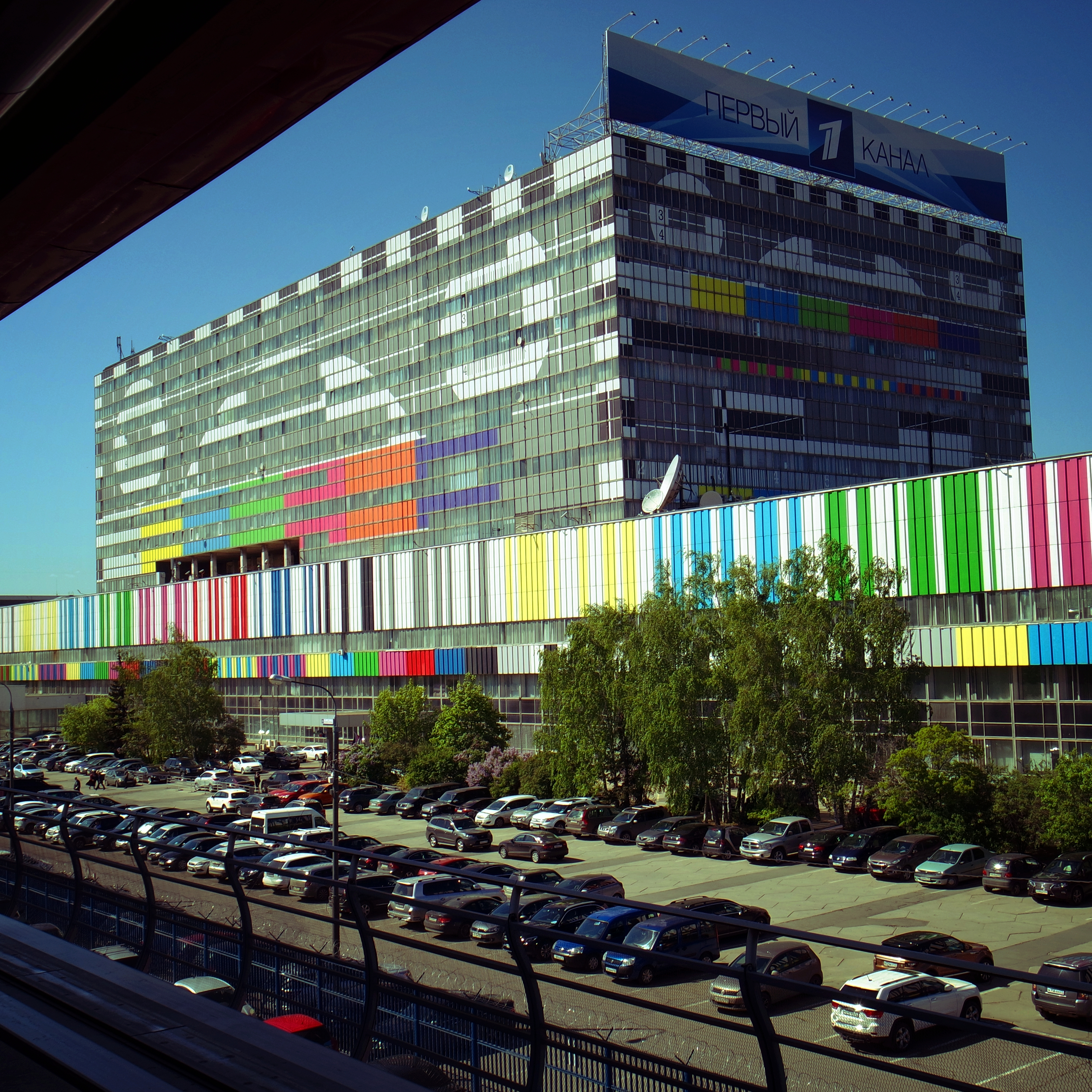 Телевизионный технический центр Останкино (Москва, май 2016)